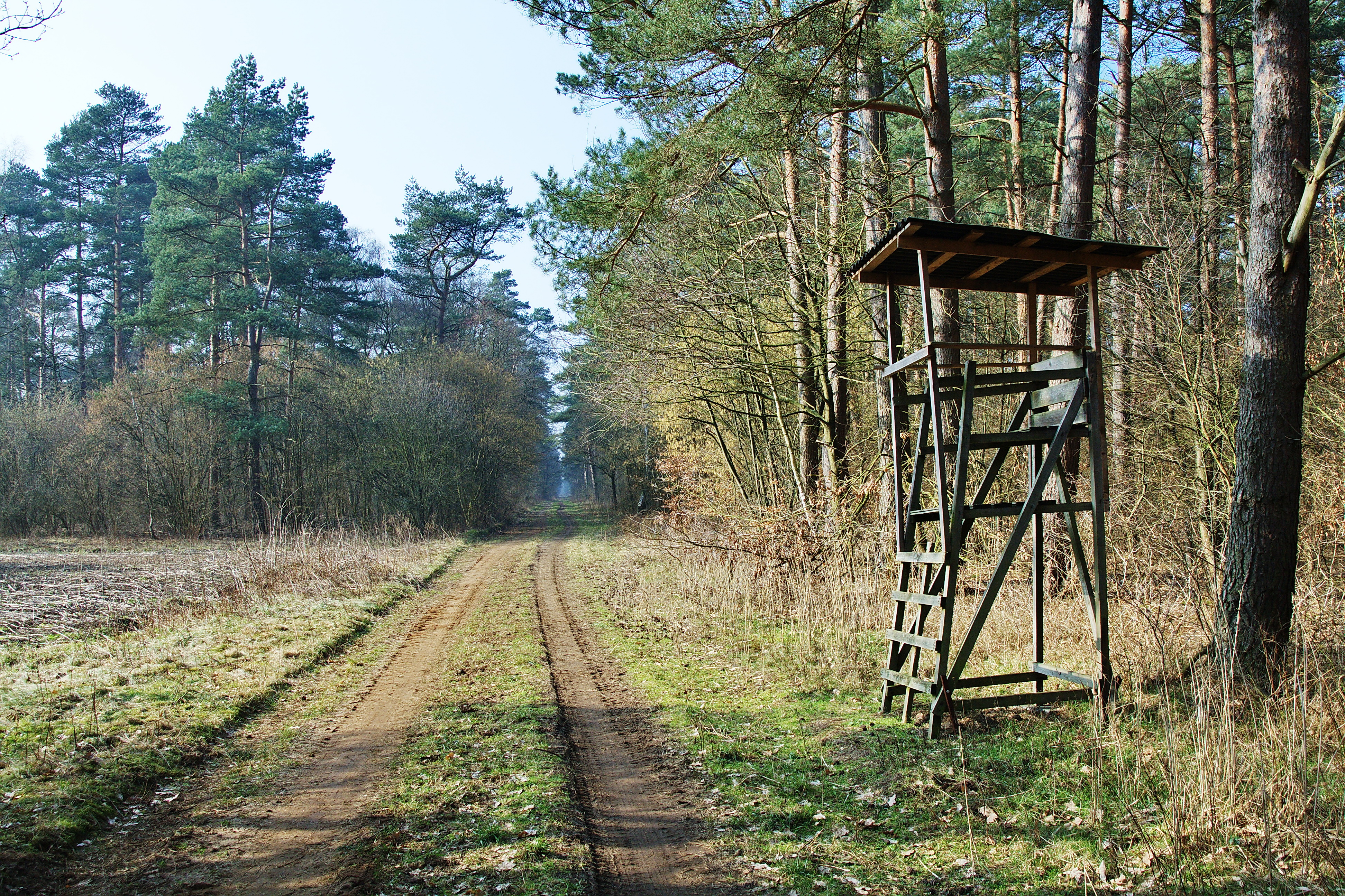 Forst Rundshorn in der Wedemark, Niedersachsen, Deutschland